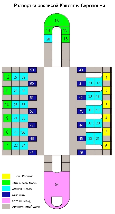 Cappella degli Scrovegni - scheme